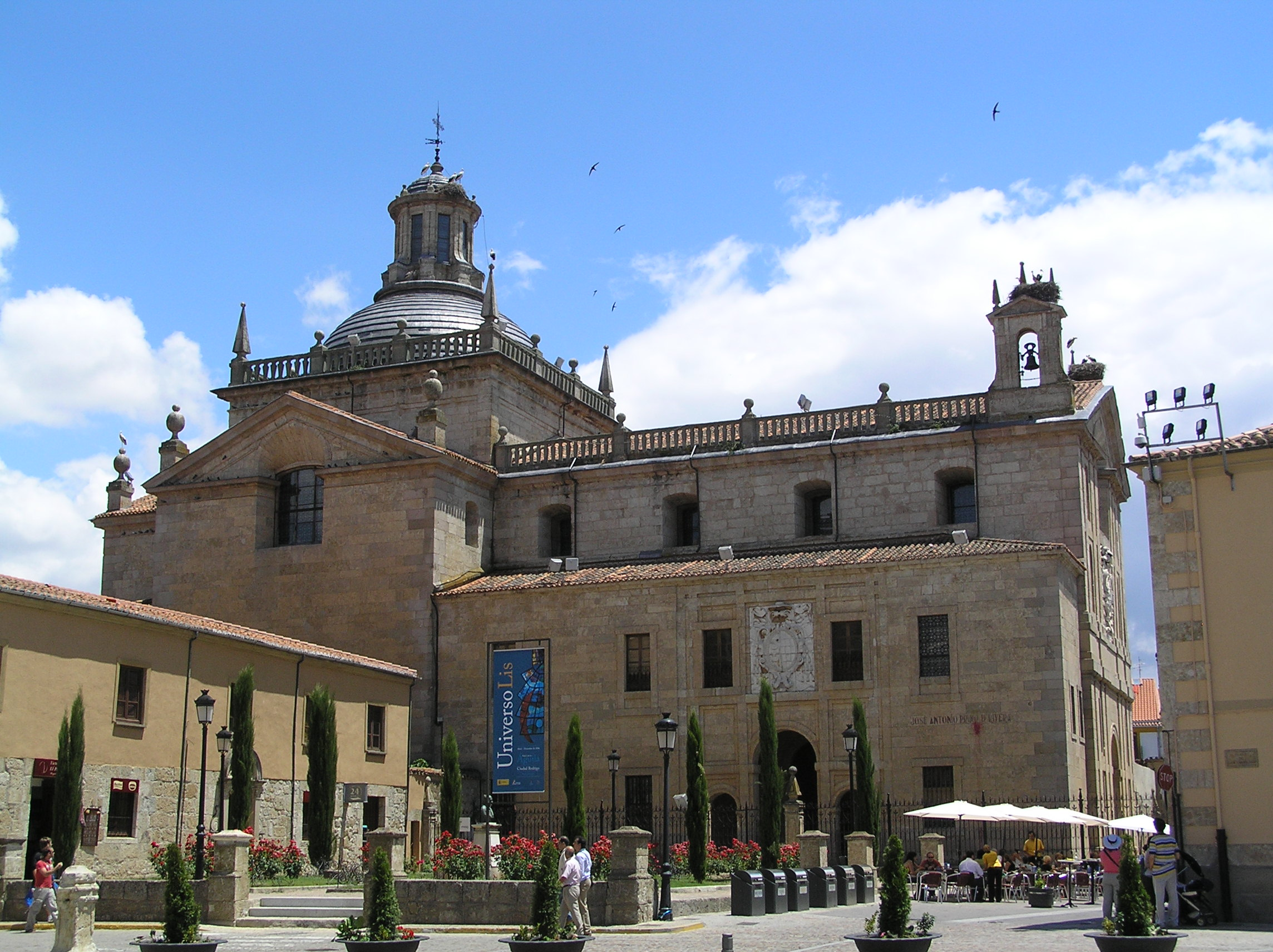 Vista de la Capilla de Cerralbo desde la Plaza de San Salvador. Ciudad Rodrigo (provincia de Salamanca, España)